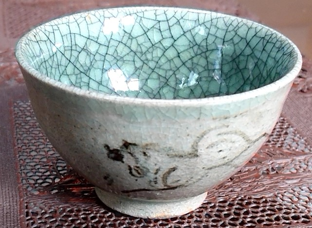 福島県相馬地方特産の陶磁器